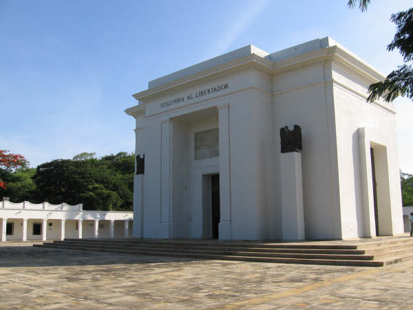 Panteon de la Patria. Santa Marta, Colombia.